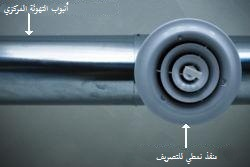 أُنبوب تهوئة مركزي به منفذٌ لِلتصريف.